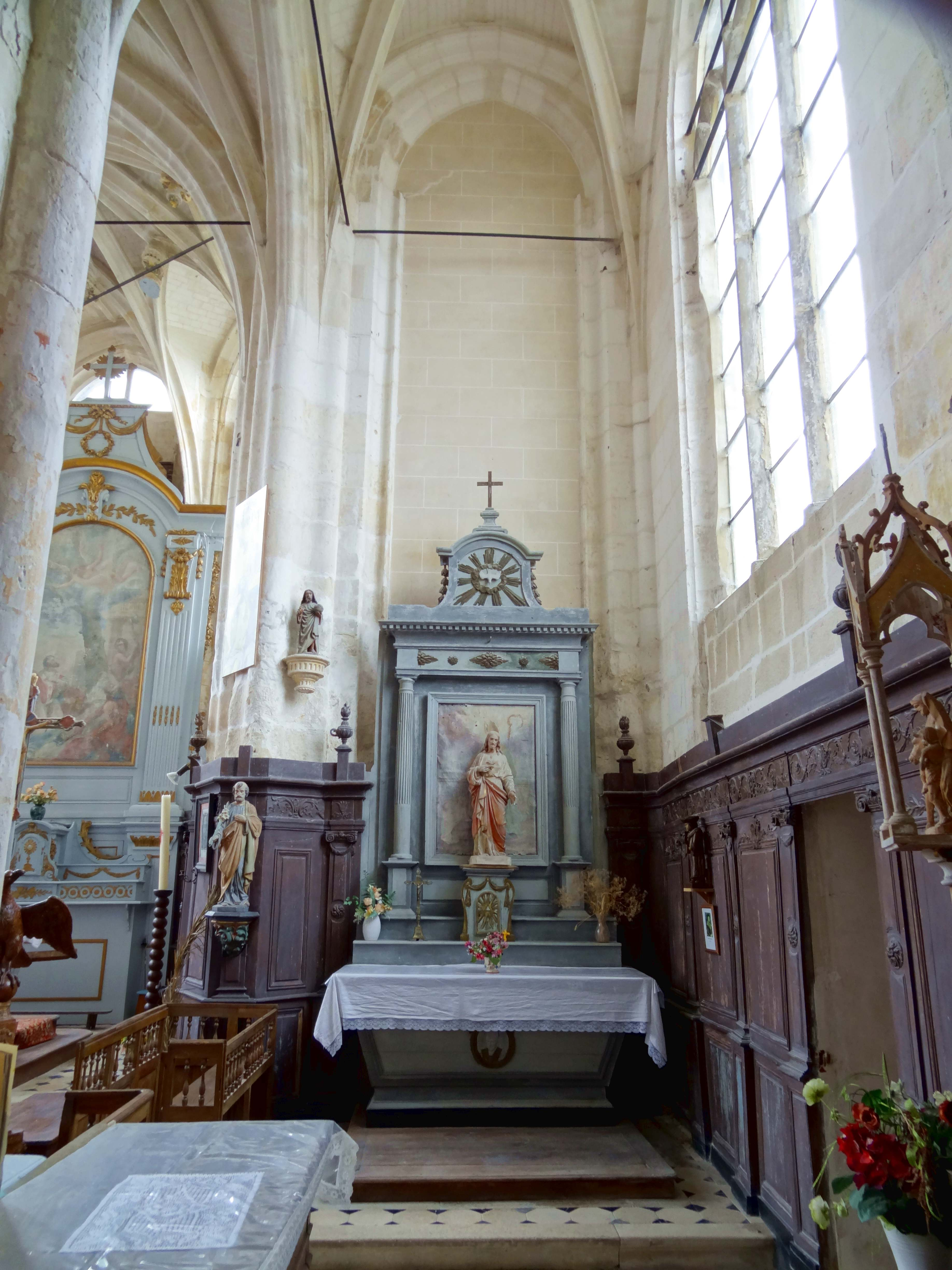 Intérieur de l'église - voir titre.